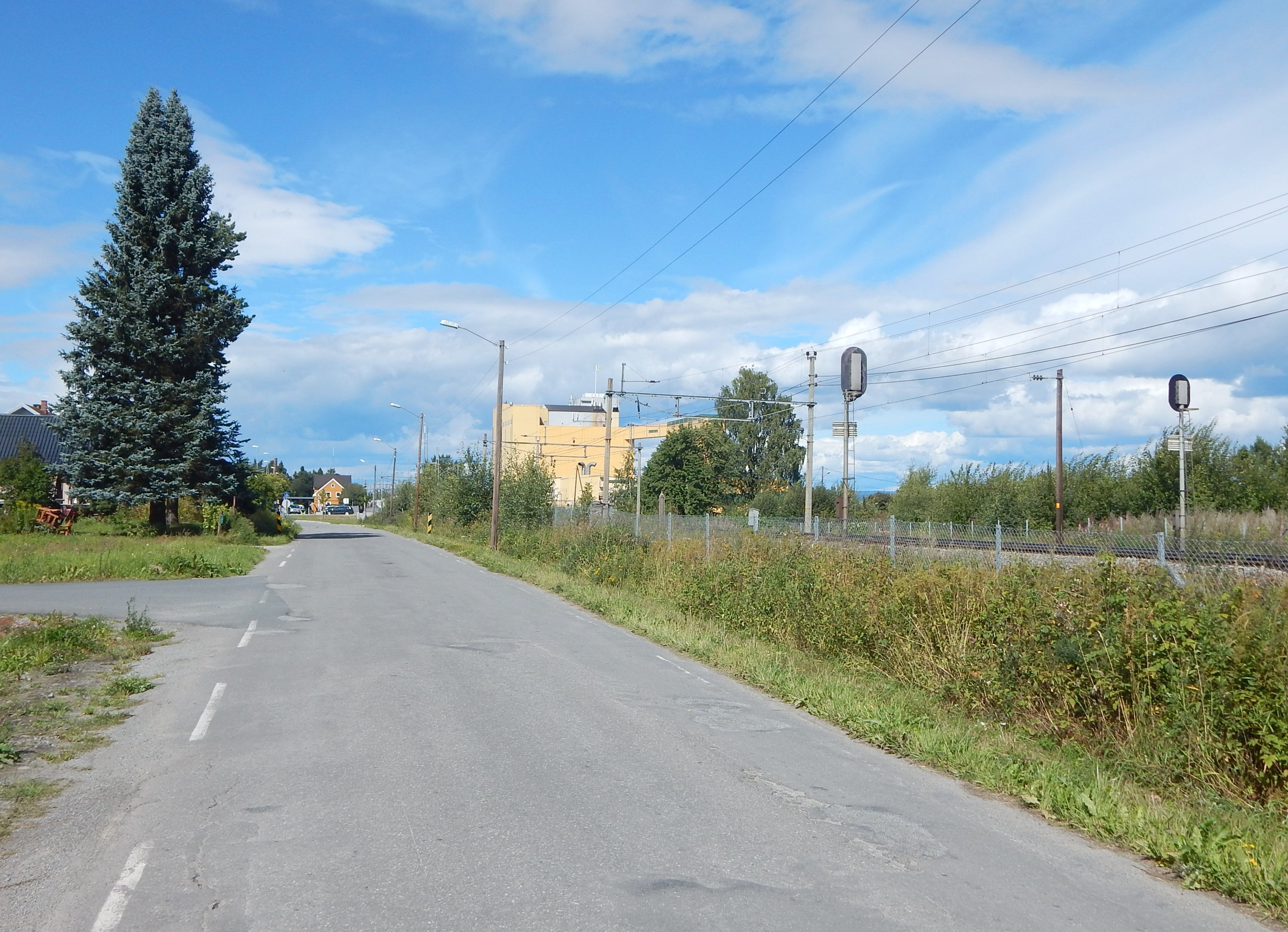 Jernbanegata (fylkesvei 1906, tidl. 234) nordover mot Stange stasjon